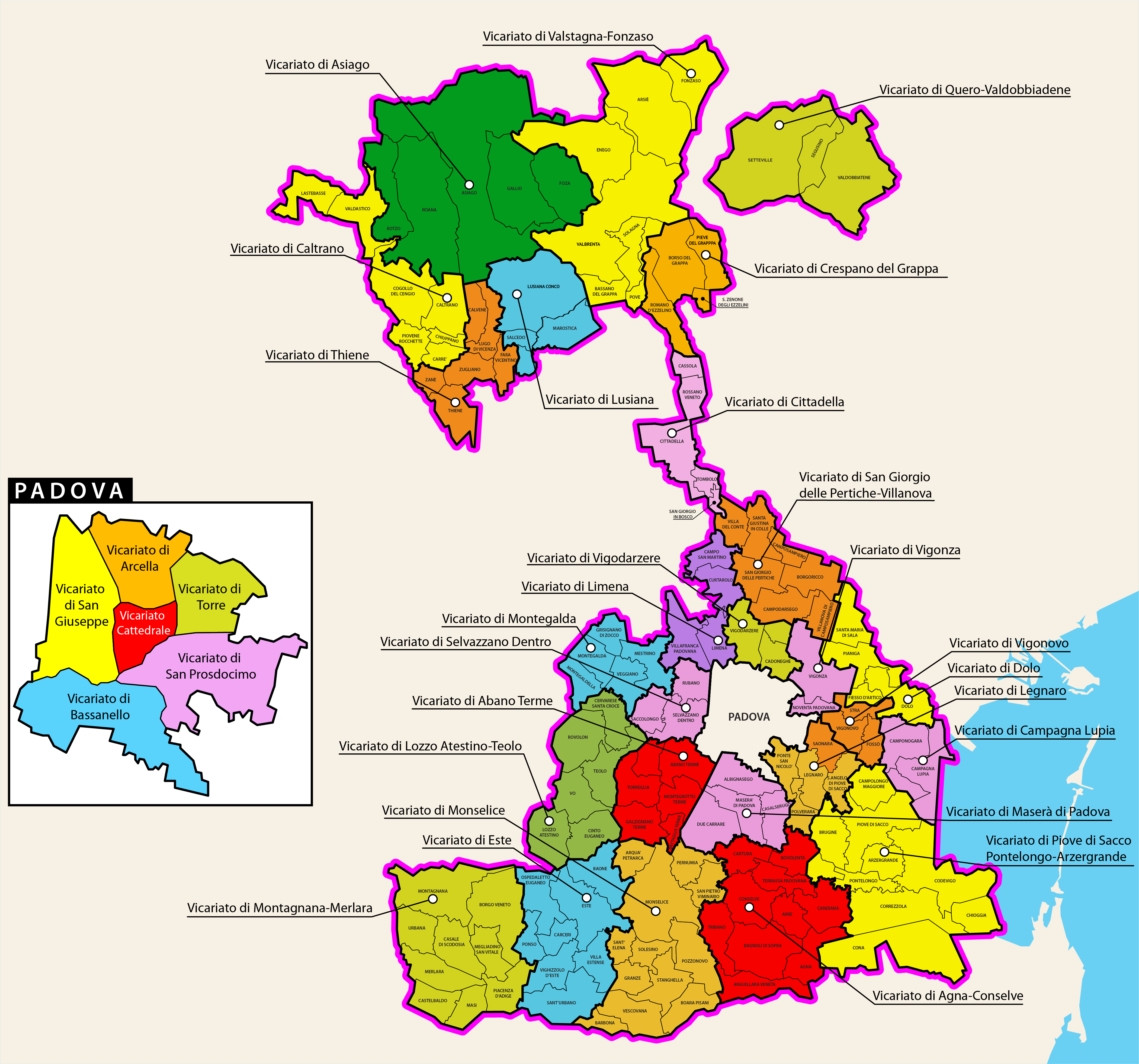 Mappa della Diocesi di Padova e la divisione in Vicariati